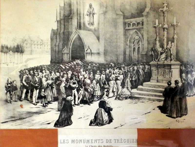 Landreger. Kalvar an Enebadur